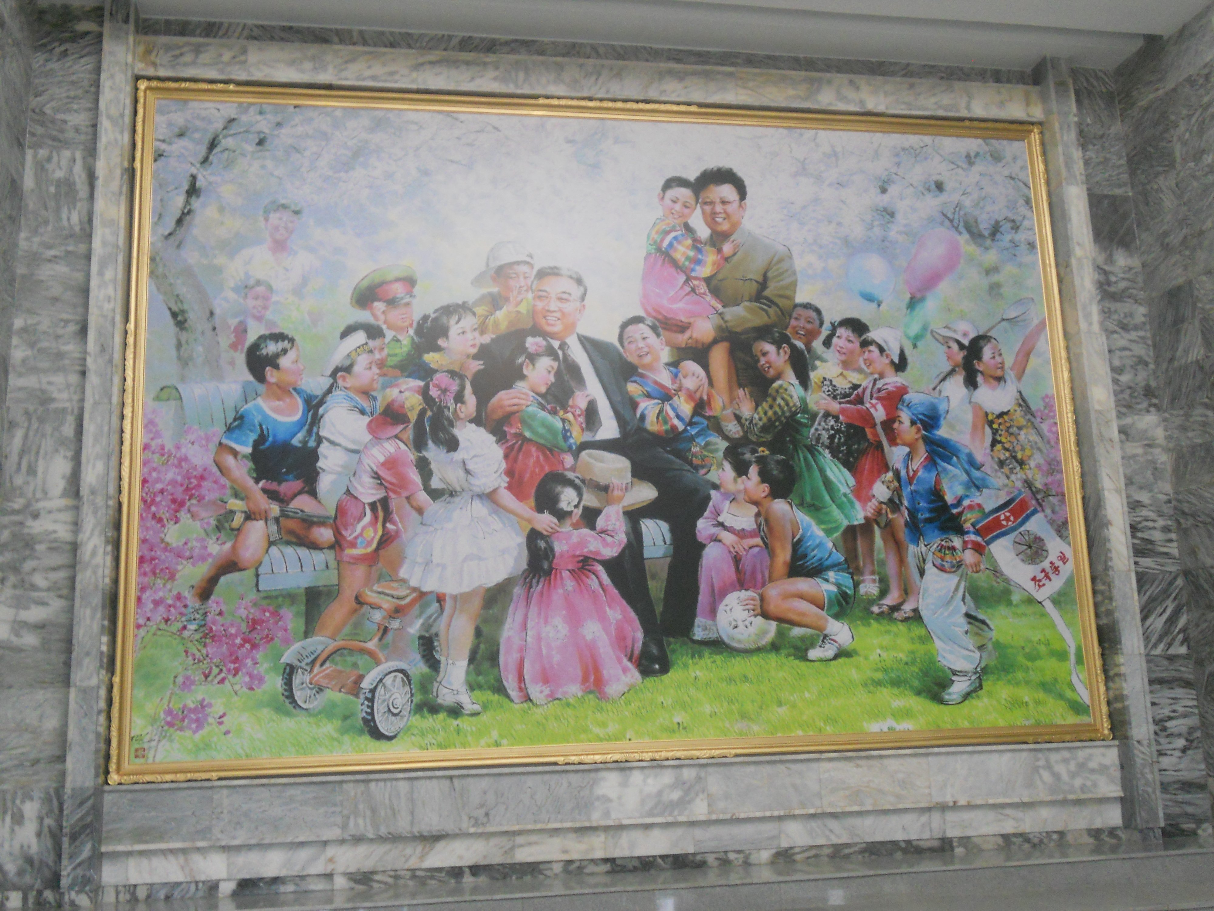 Samijyon